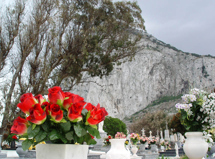 Gibraltar